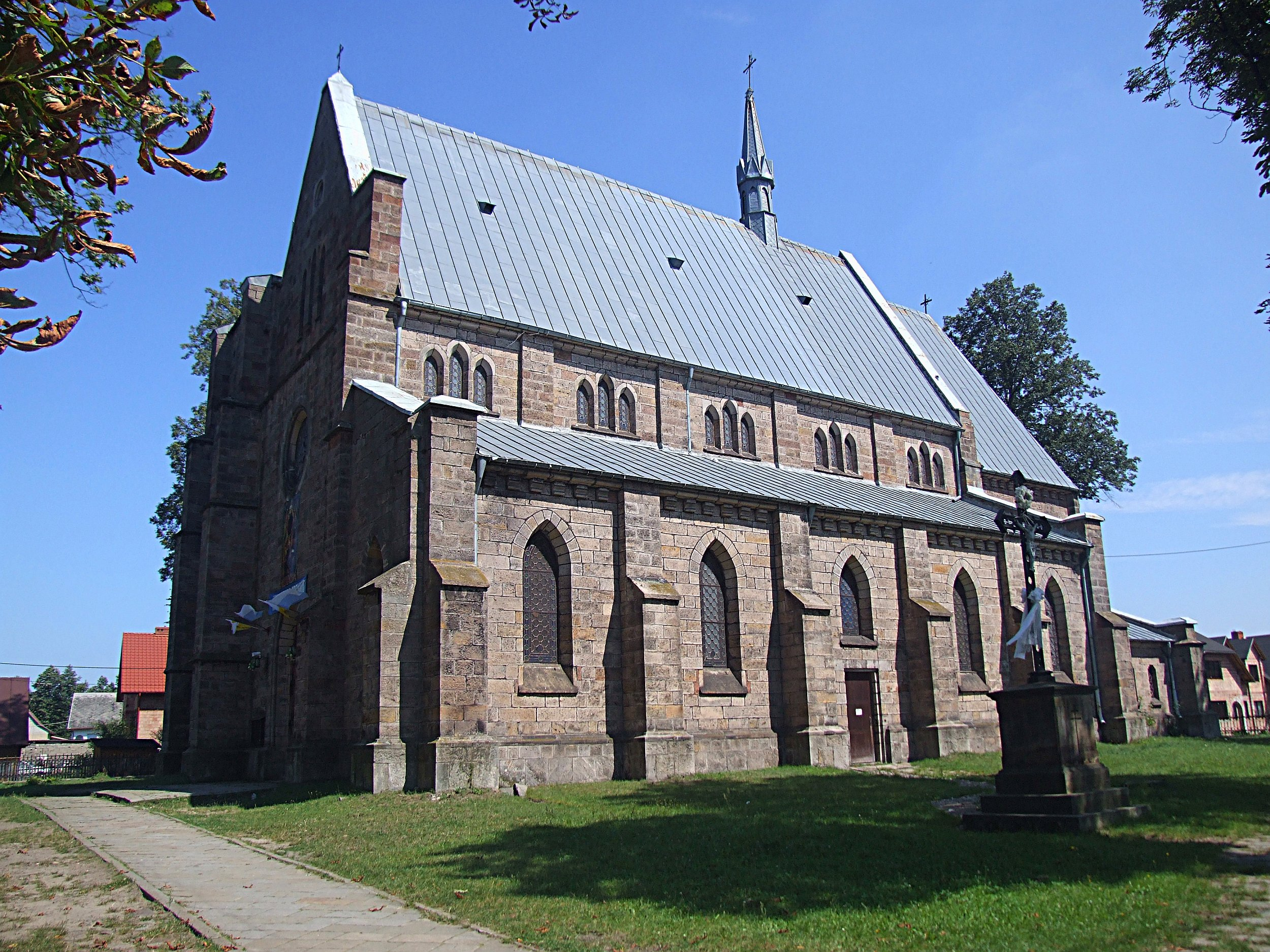 Bliżyn - kościół parafialny pw. św. Ludwika z 1896 r. 271 from 27.04.2009.